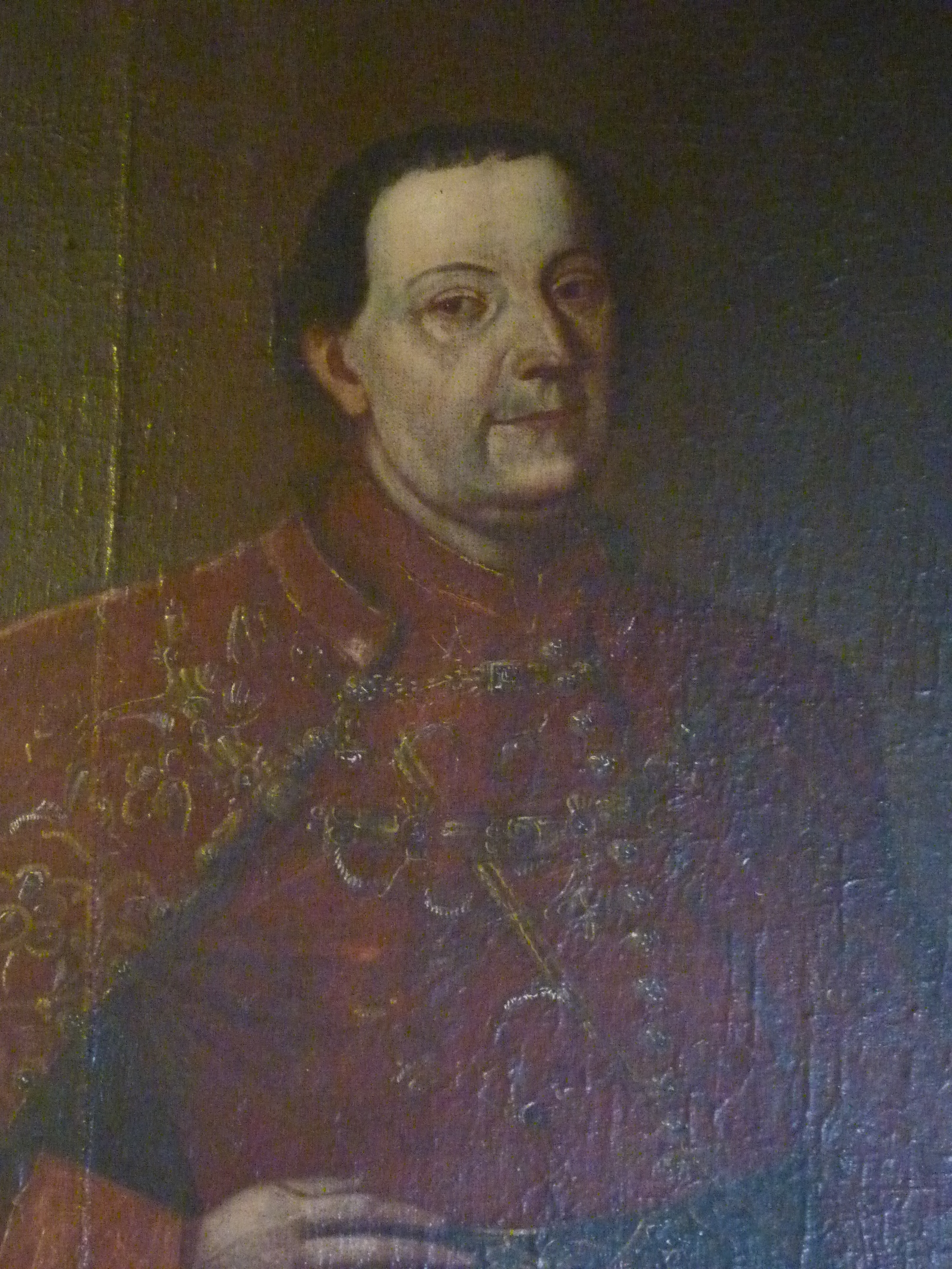 A felvétel 2014. december 4-én csütörtökön készült Boldogasszonyban. Eszterházy Pál herceg festményének részlete a Kegytemplomban. ©© Derzsi Elekes Andor, Budapest, 2014, A kép egészben, vagy részletekben másolását, bármilyen úton történő sokszorosítását és felhasználását a szerző ellenérték nélkül, jogutódjaira is kihatóan megengedi. Az engedély kiterjed a kereskedelmi célú hasznosításra is. Kéri azonban nevének feltüntetését a felhasználás során. A Metapolisz sorozat valamennyi képe és filmje Creative Commons alatti valamint kereskedelmi - for profit - célra is felhasználható. Ajánlott hivatkozás: Derzsi Elekes Andor: Metapolisz DVD line